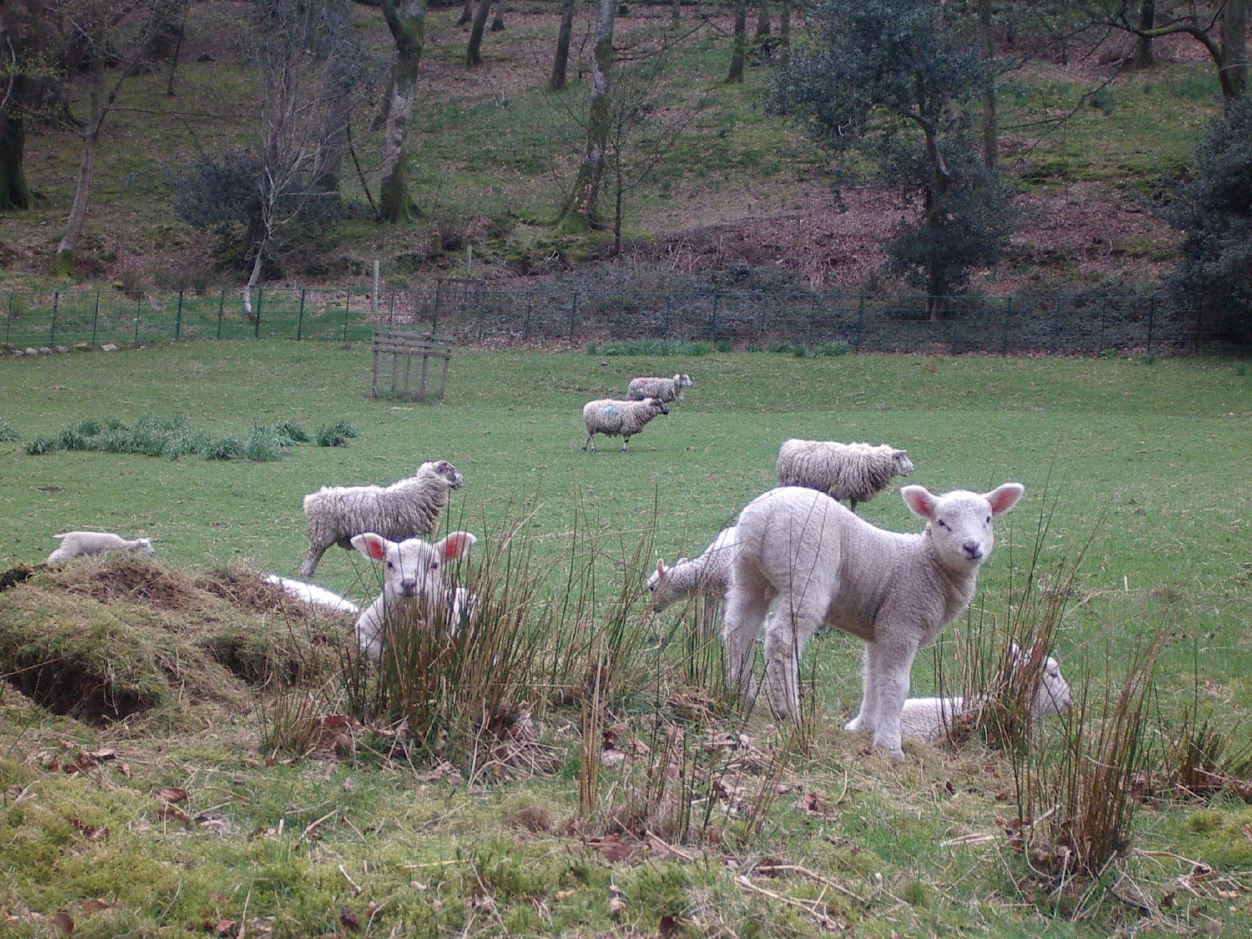 Lemma.